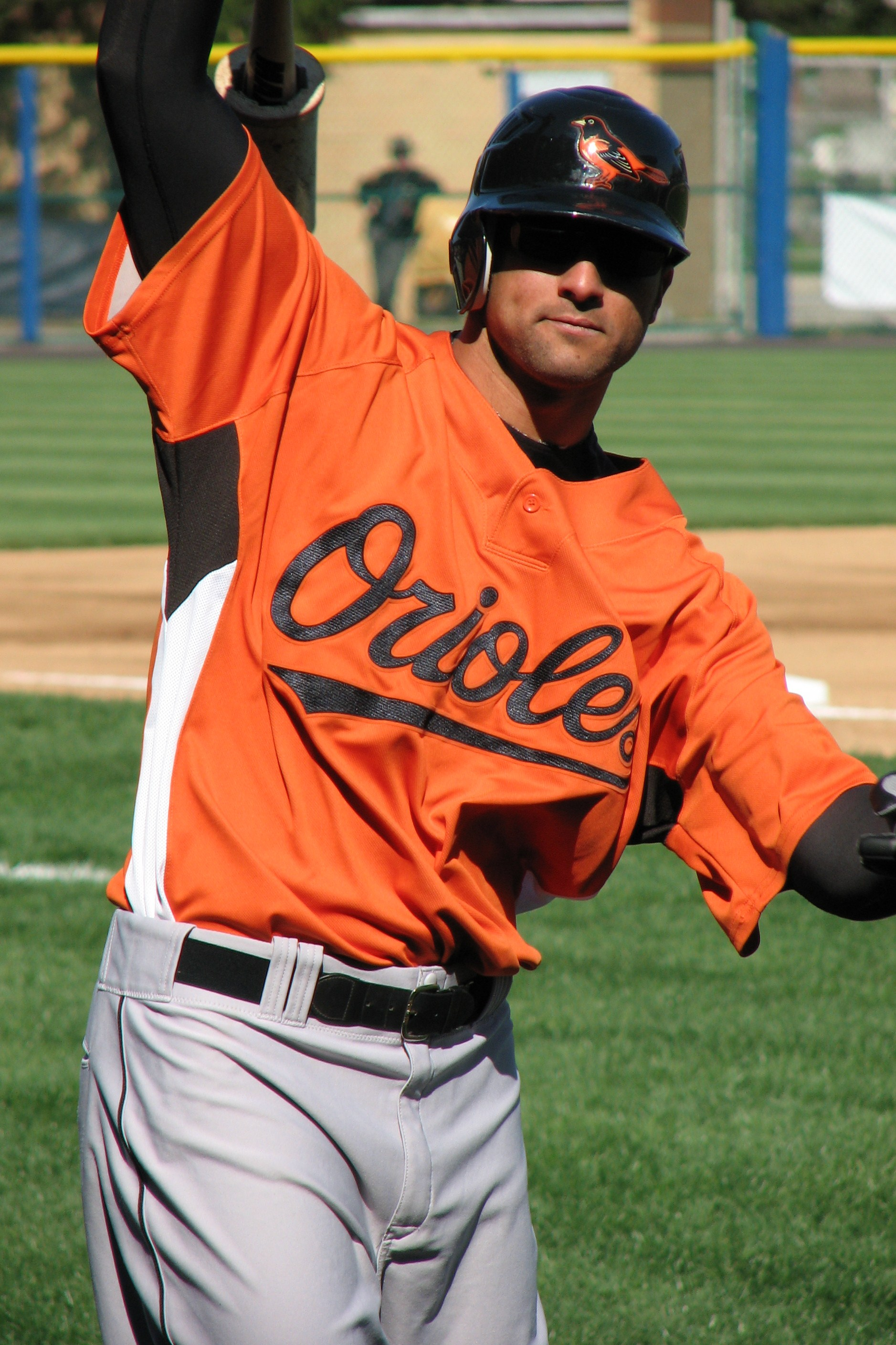 Nick Markakis